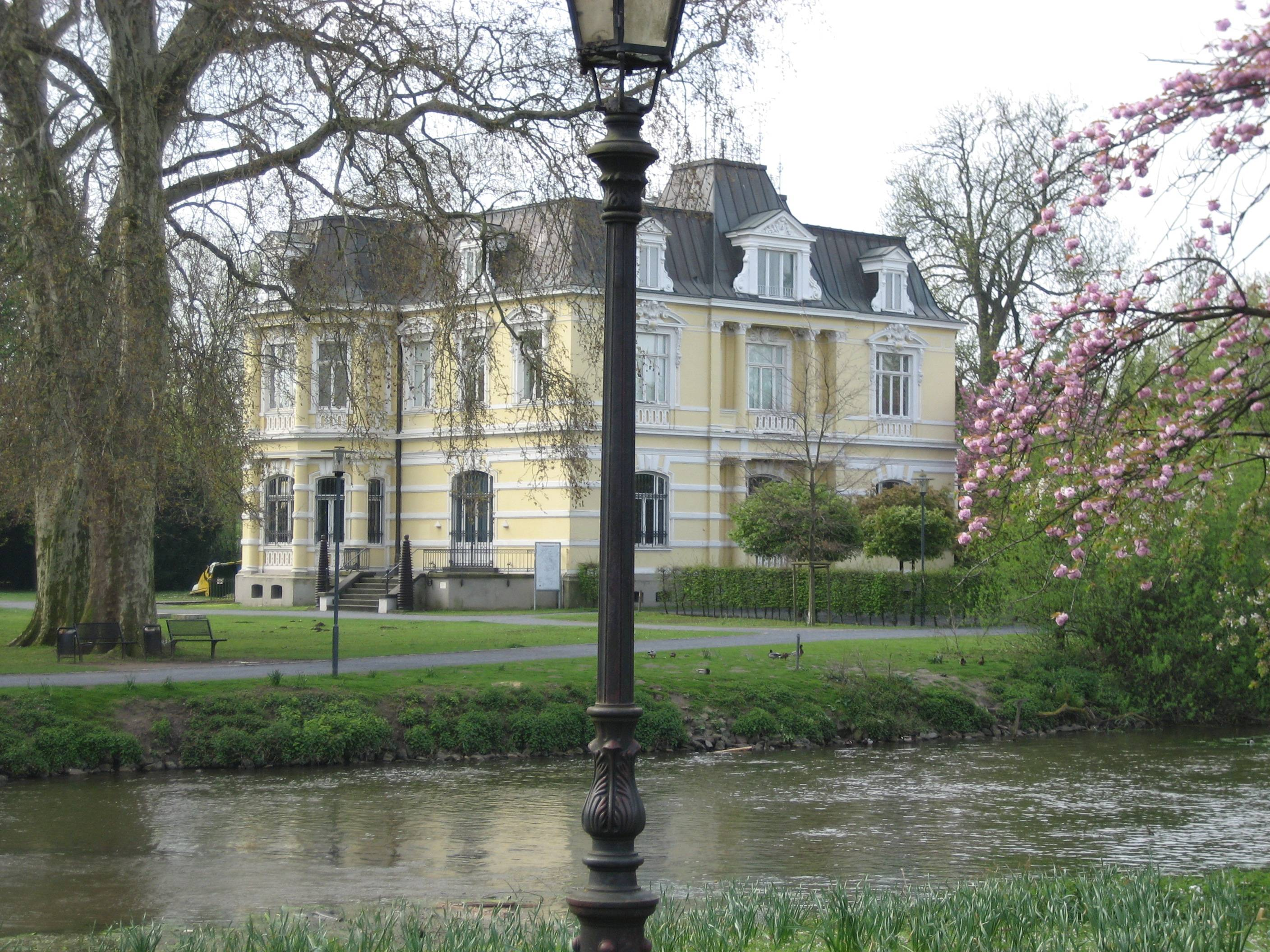 Die Villa Erckens von der Stadtparkinsel aus aufgenommen.